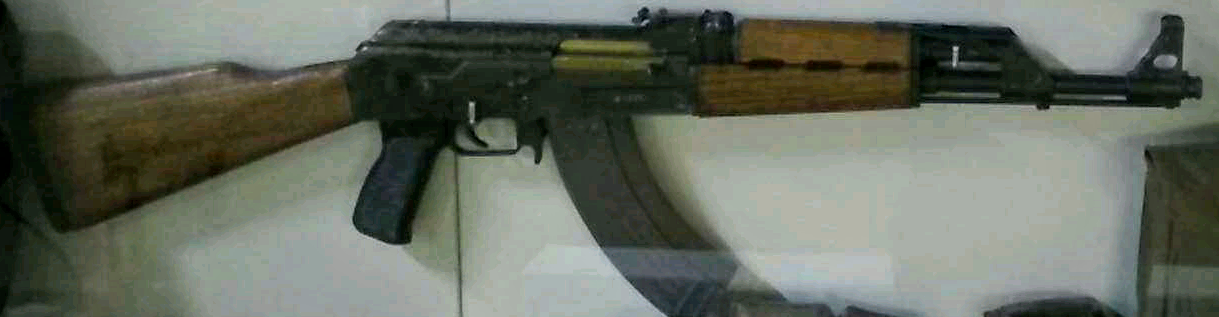 Avtomatska puška M70